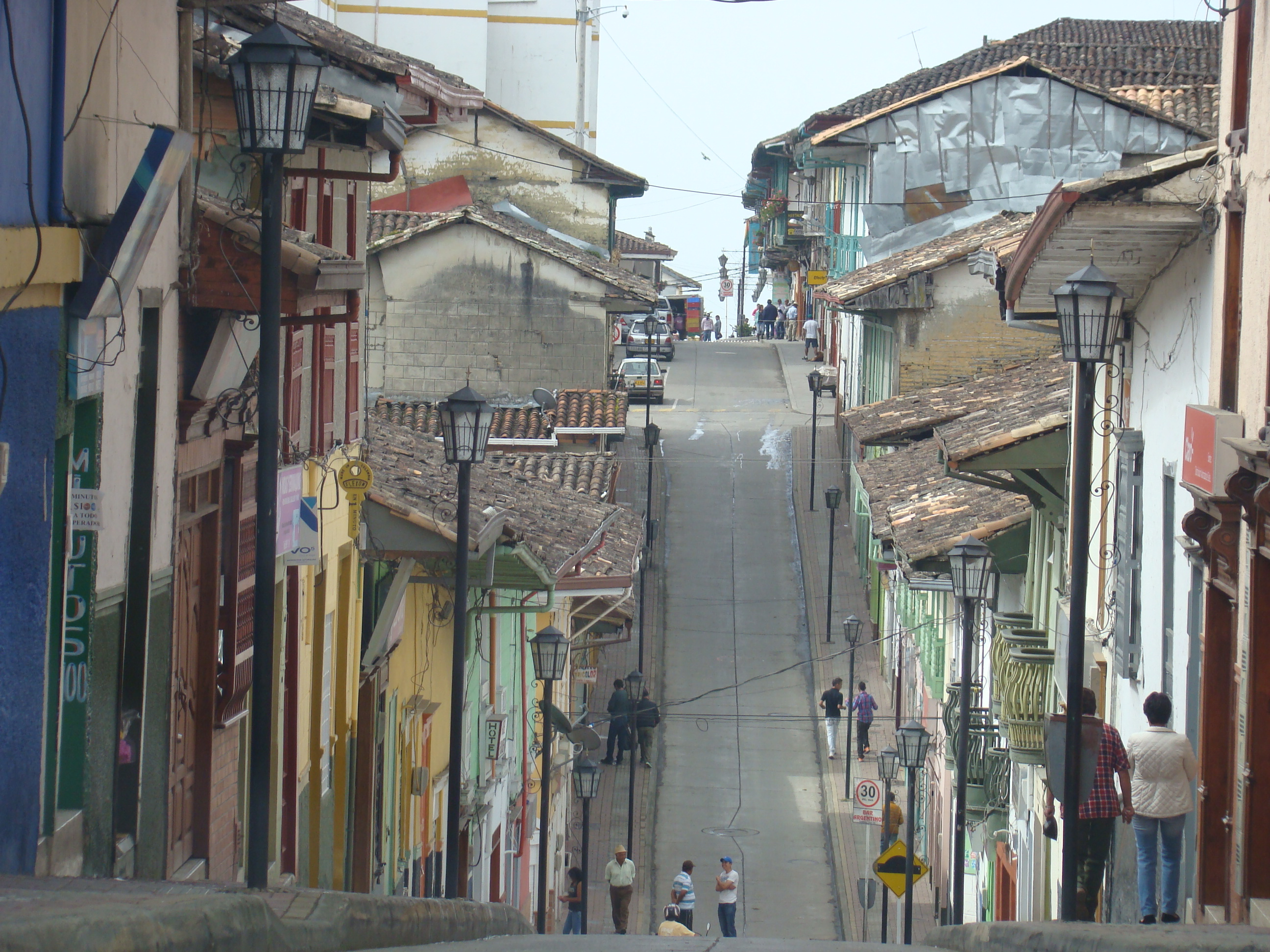 Pasaje comercial "La Cañada" en Sonsón